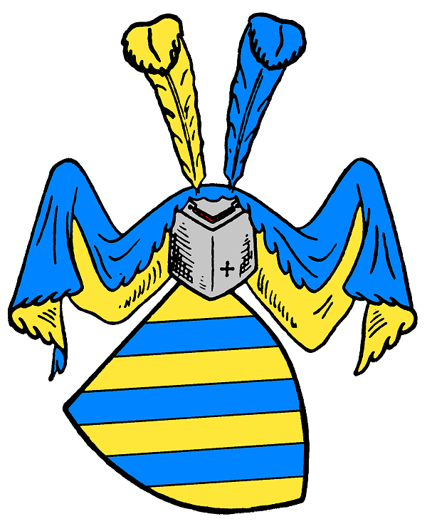 Wappen derer von Nieroth